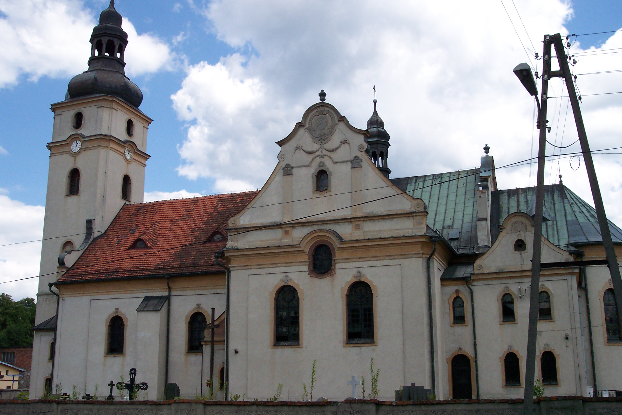 Kościół św. Antoniego w Tworogu